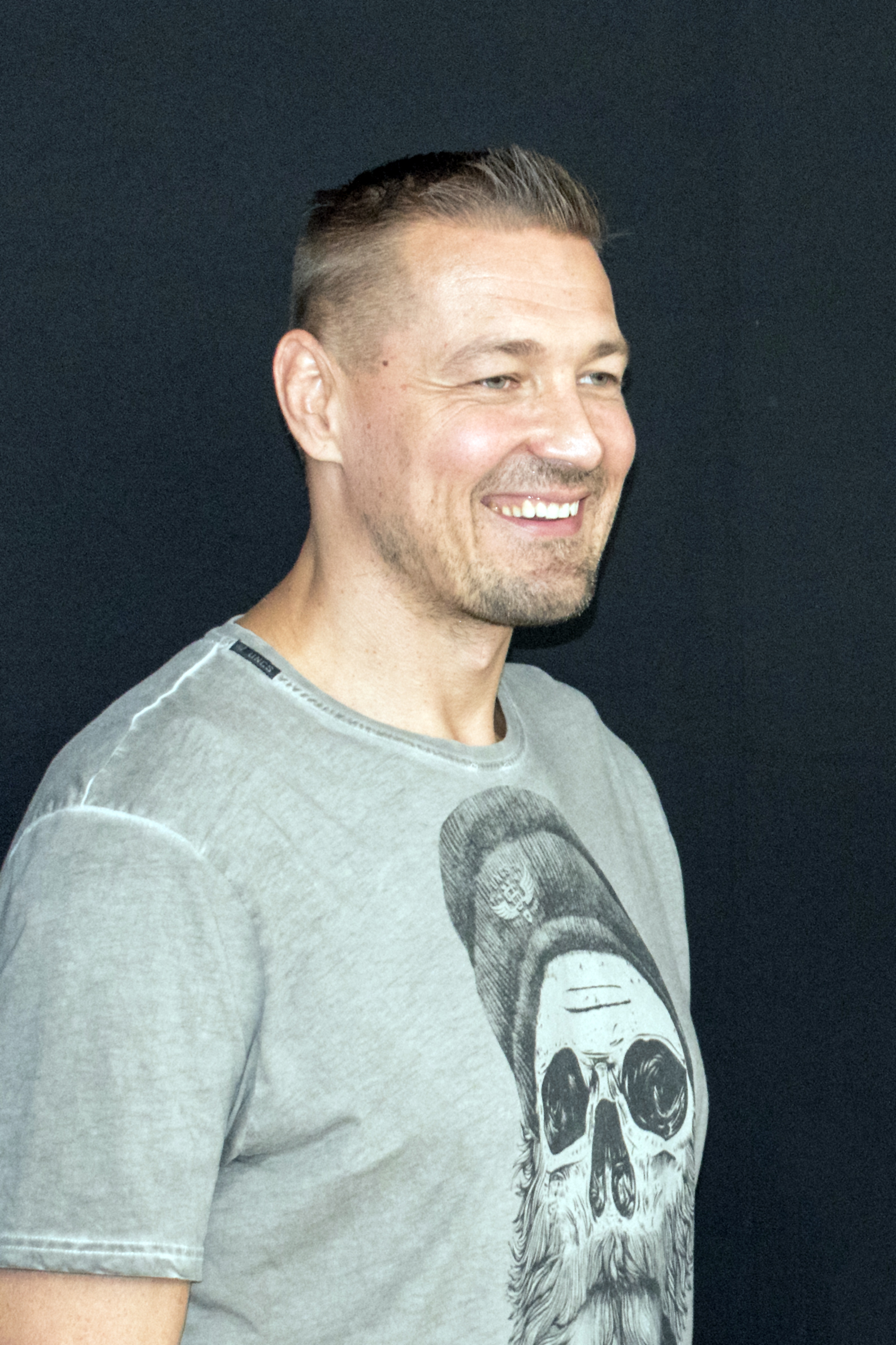 Novinářská konference 13. 9. 2018. Autor: Blanka Borová (Karolína Černá) pro Kritiky.cz